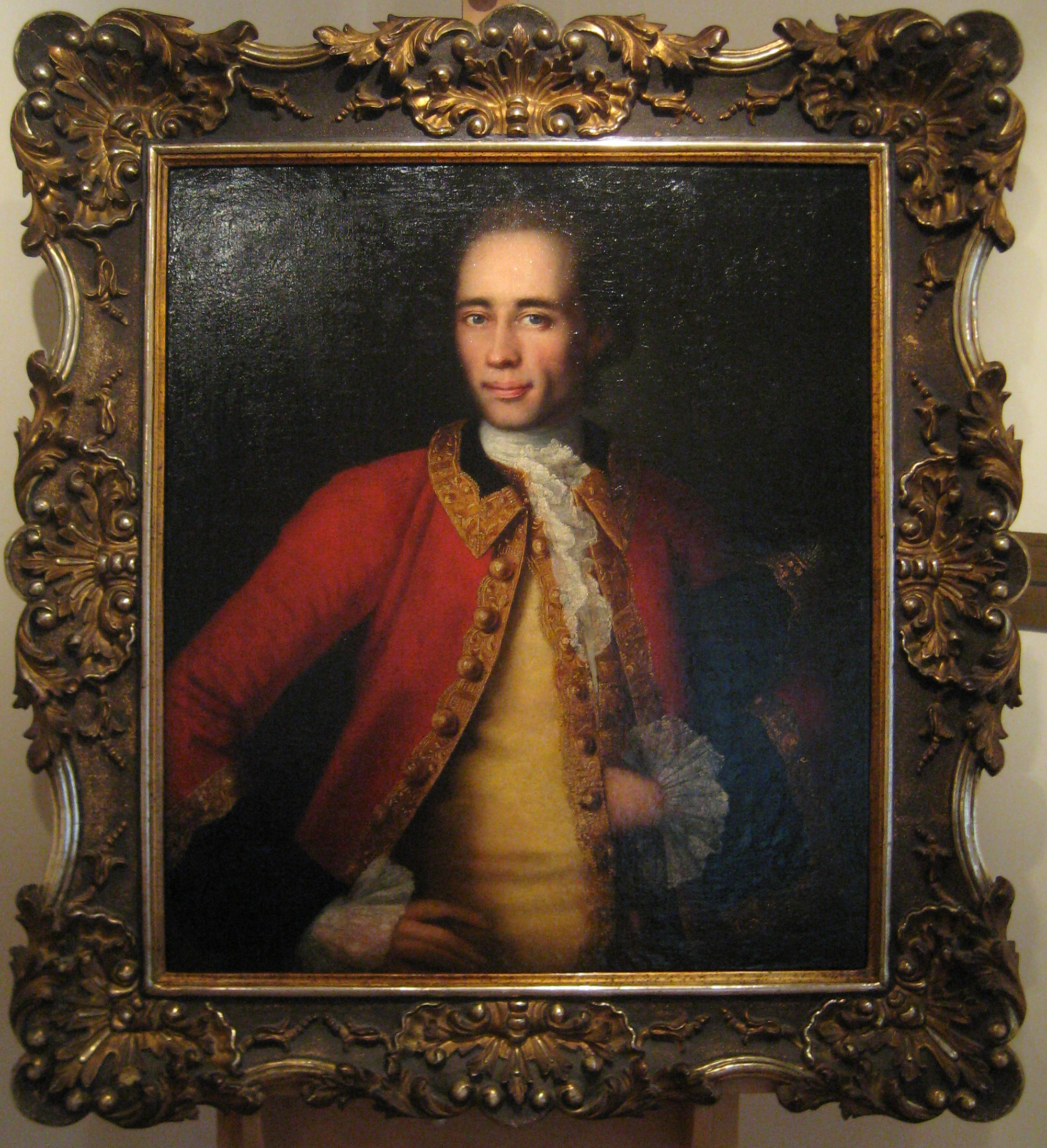 Вишняков Иван Яковлевич. Портрет Матвея Семёновича Бегичева(1723-1791), 1757г.